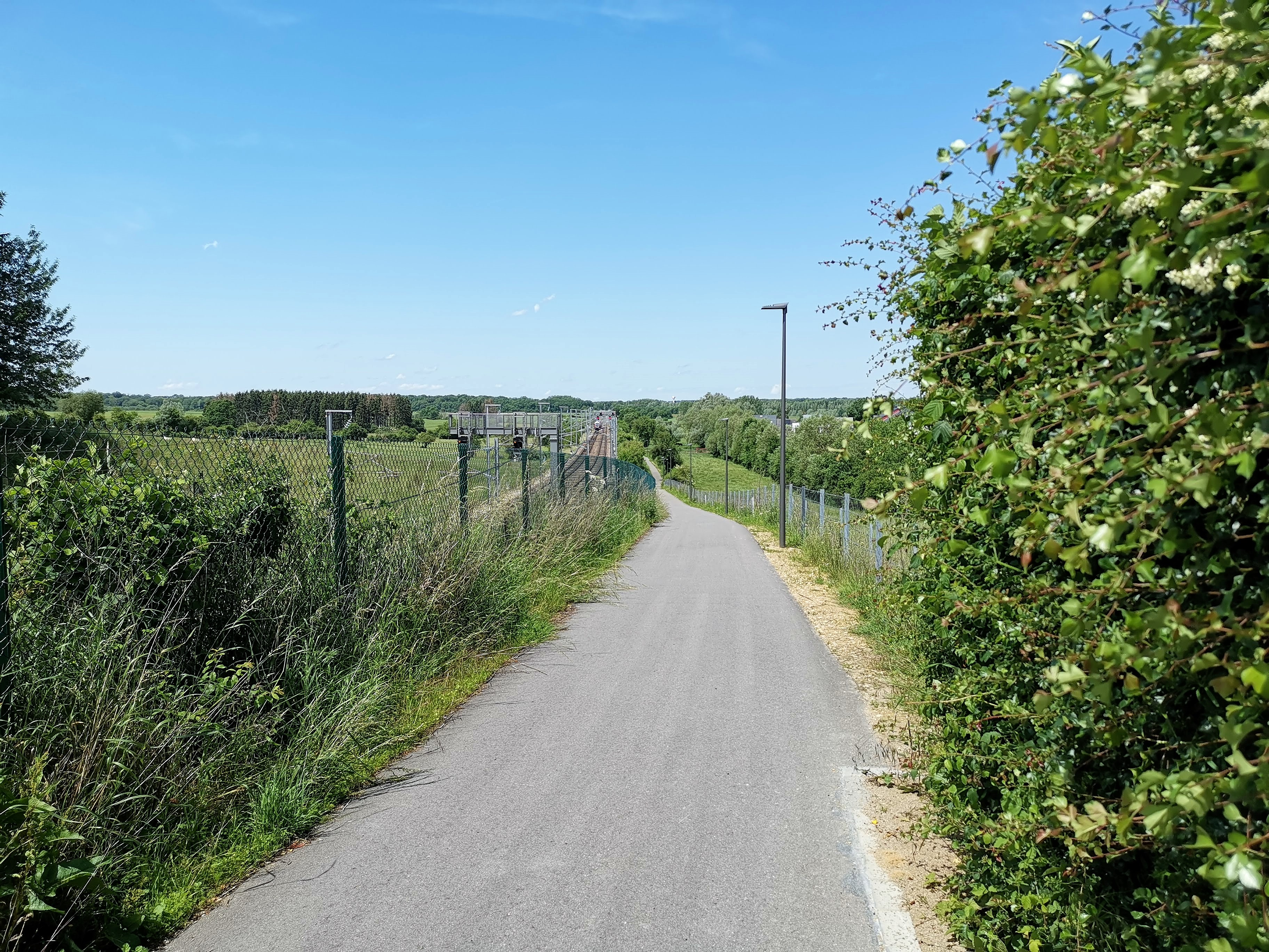 itinéraire cyclable Eisch-Mamer à Mamer, rue du Commerce. Vue en direction nord-ouest.